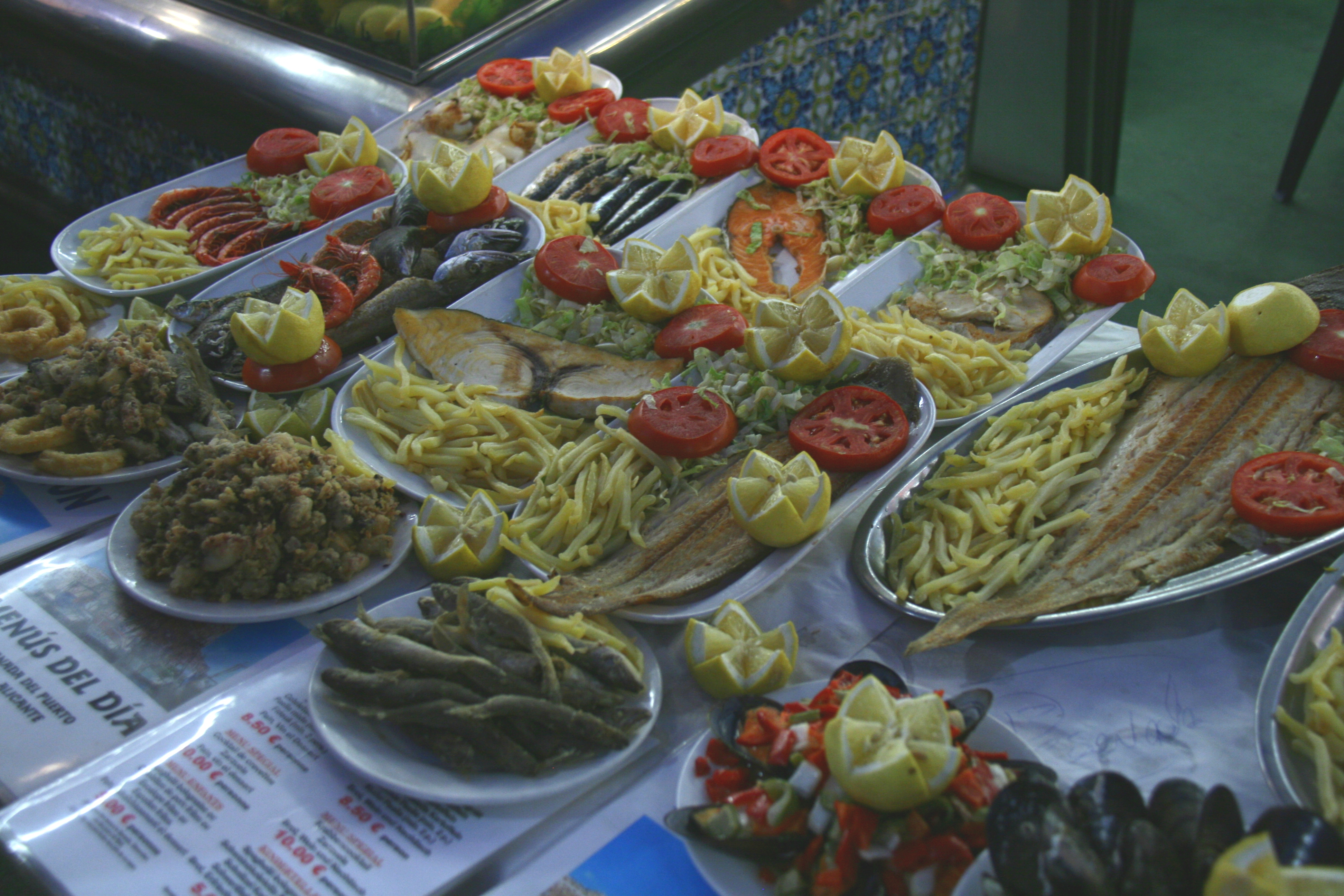 platos de costa